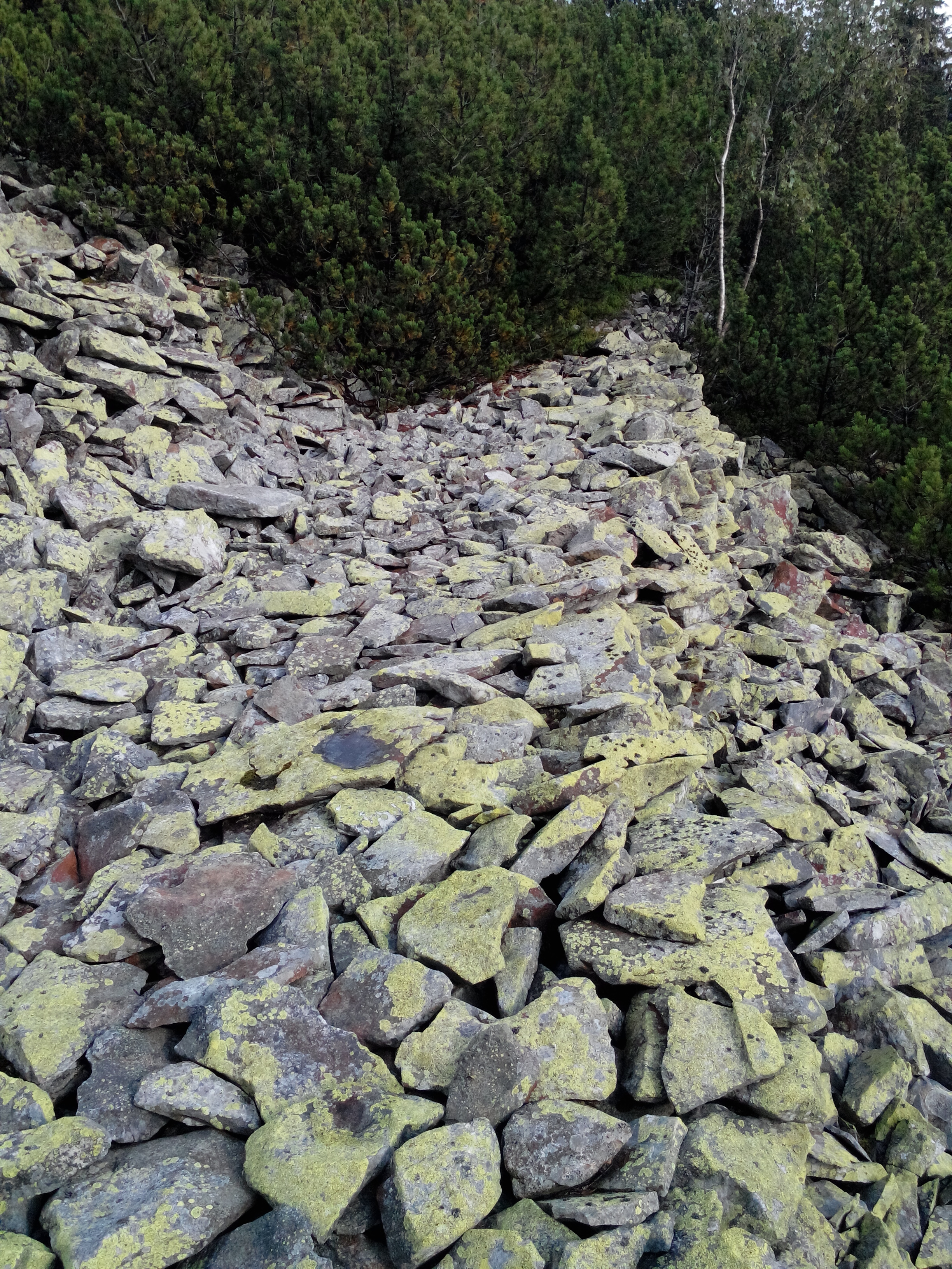 Траверс г. Попадя